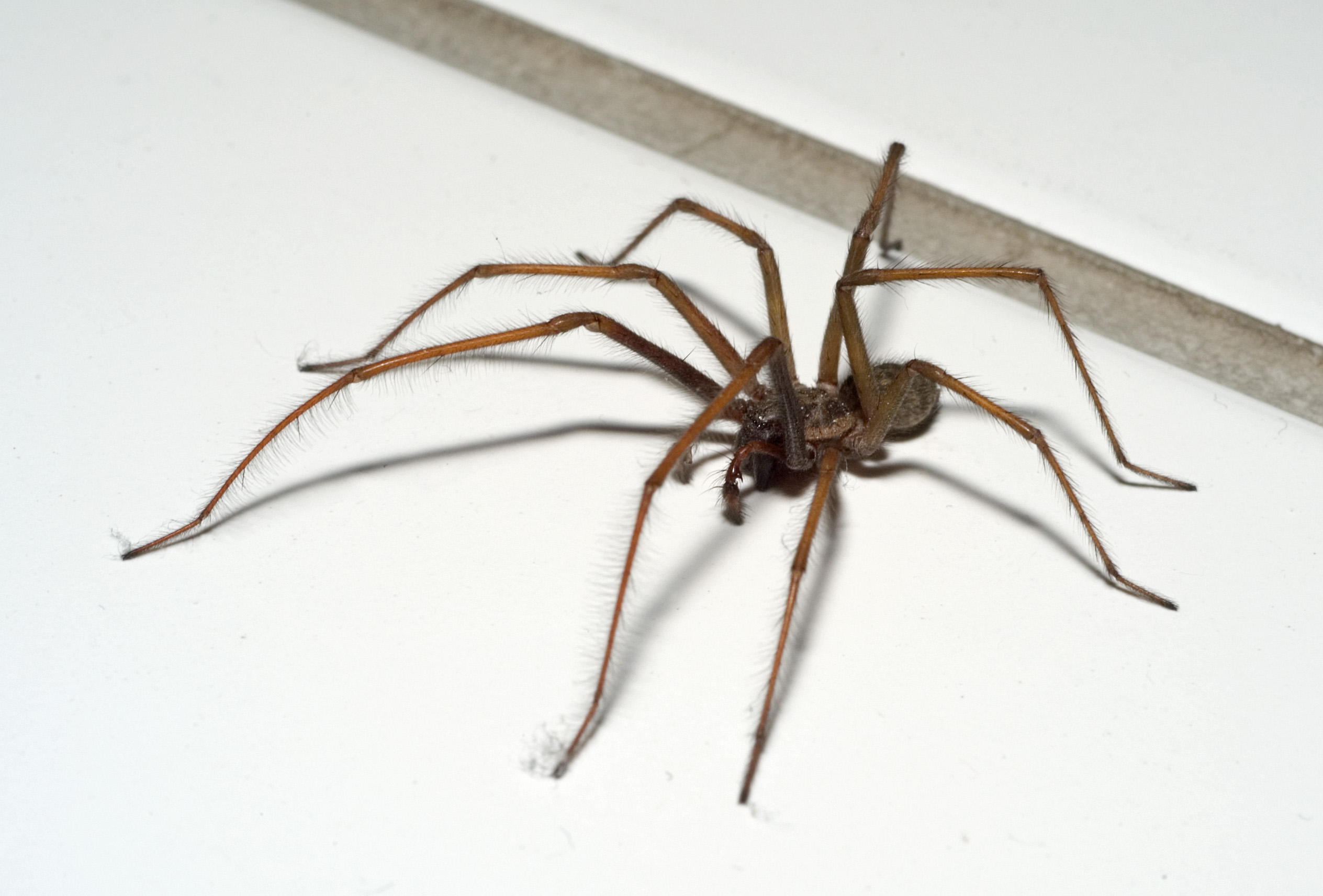 Description: male Tegenaria atrica